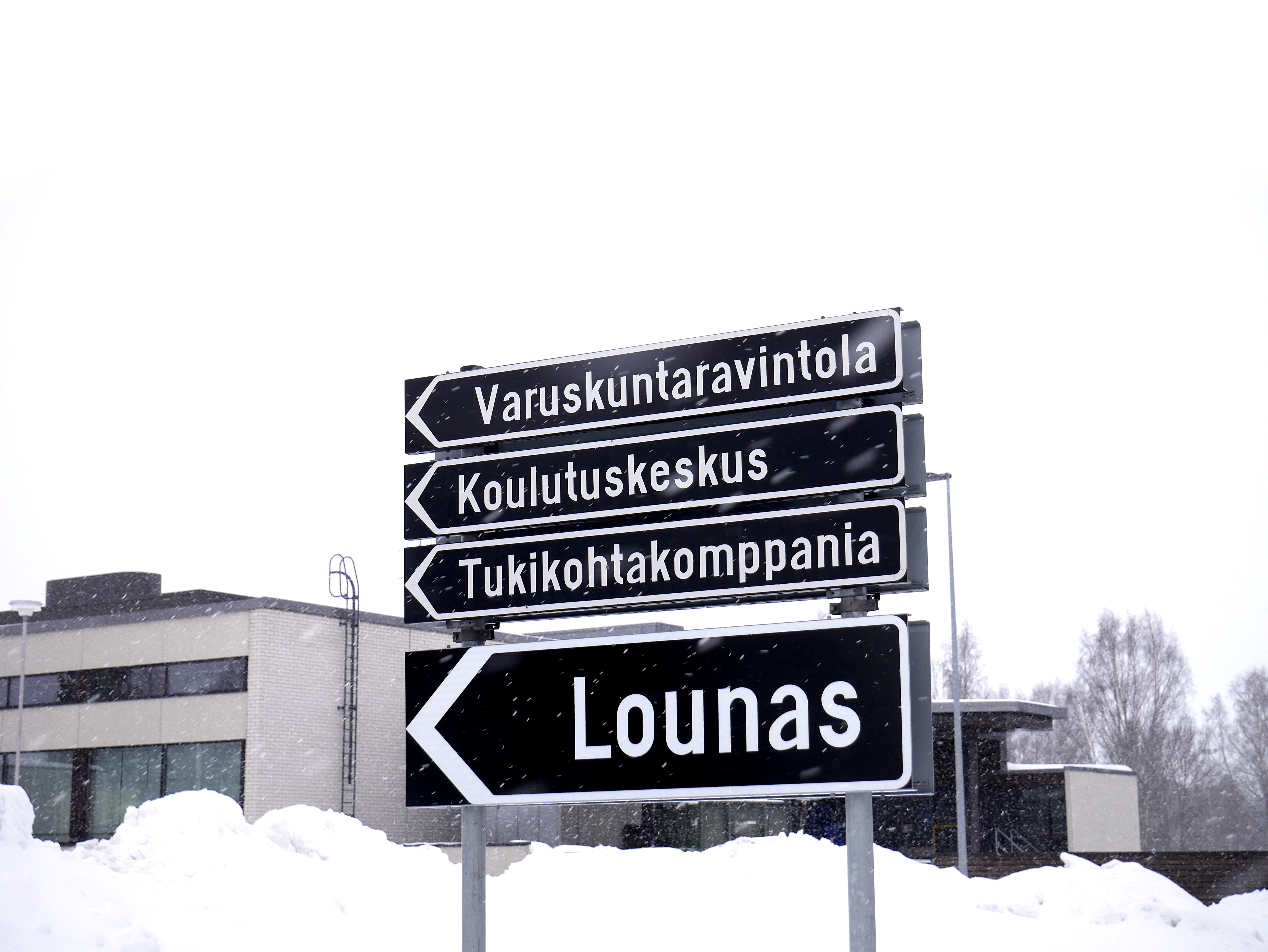 Kylttejä entisellä Lentosotakoululla.